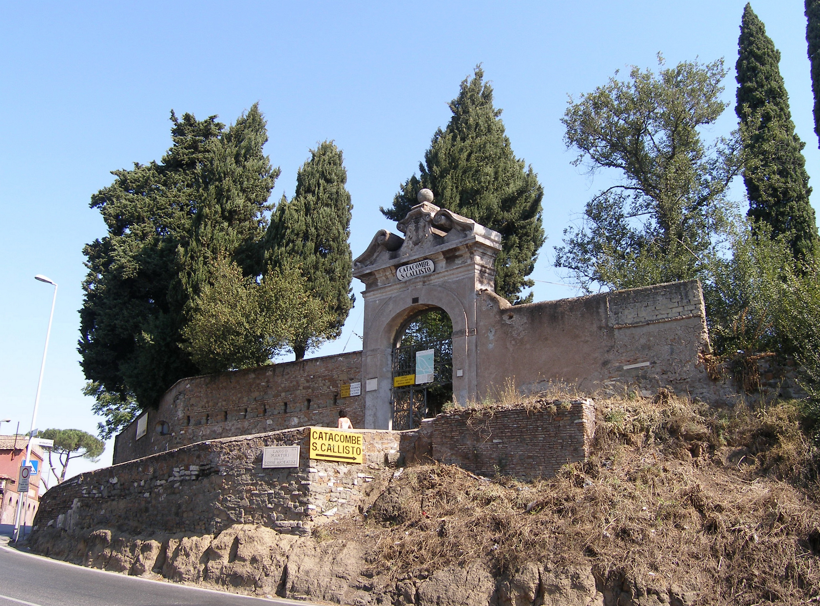 Rom, Calixtus-Katakombe, Eingangstor zum Areal der Katakombe